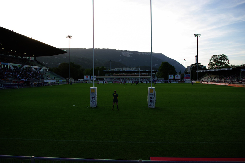 Vue de l'intérieur du Stade Lesdiguières, prise lors du match FCG-Lannemezan (Pro D2, saison 2009/2010).